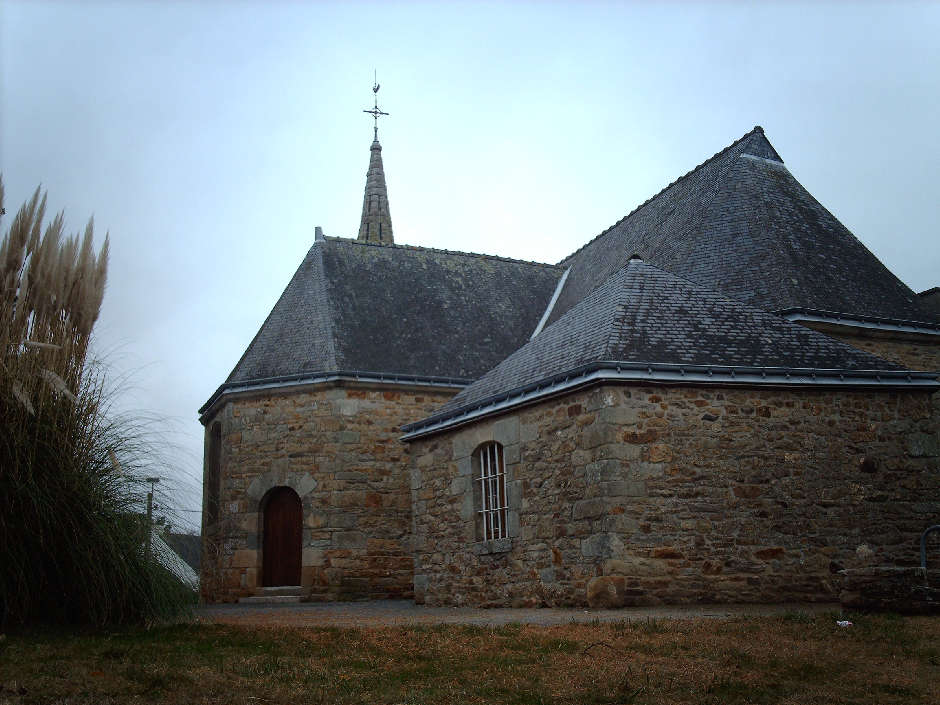 Photo de l'église de Ploeren